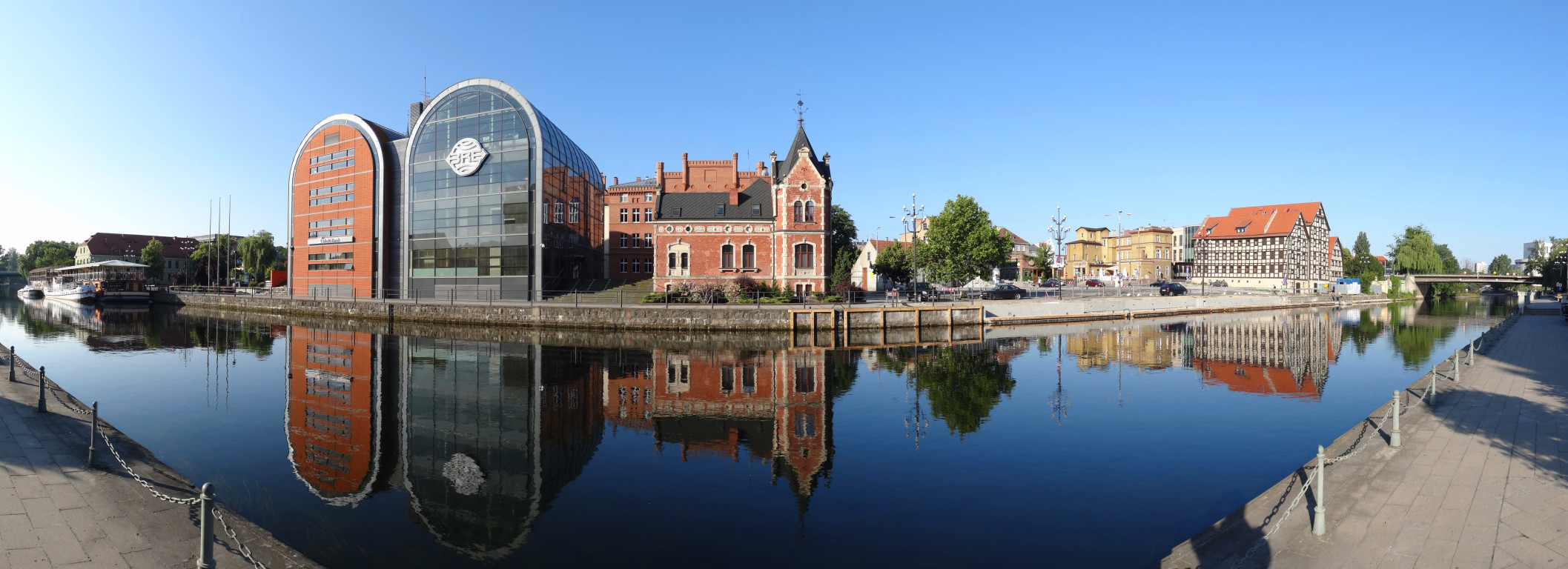 Południowe nabrzeże Brdy w centrum Bydgoszczy